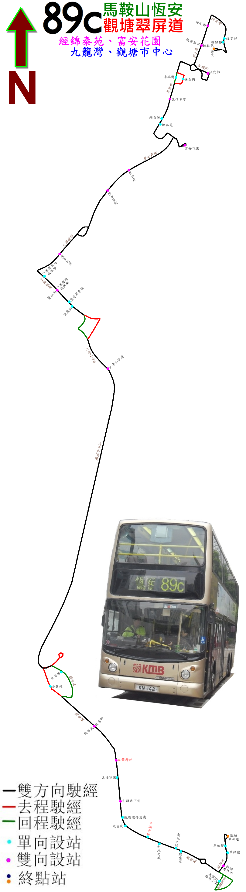 中文（香港）: 九巴89C線的走線圖